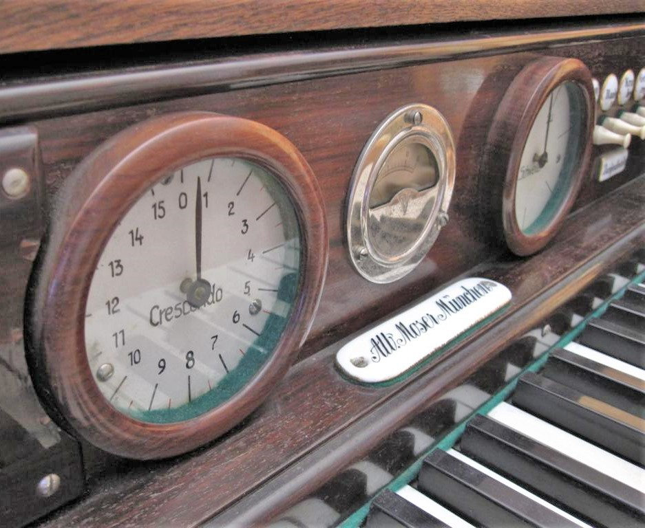 Moser-Orgel im Alten Schloss Valley (Orgelzentrum Valley)